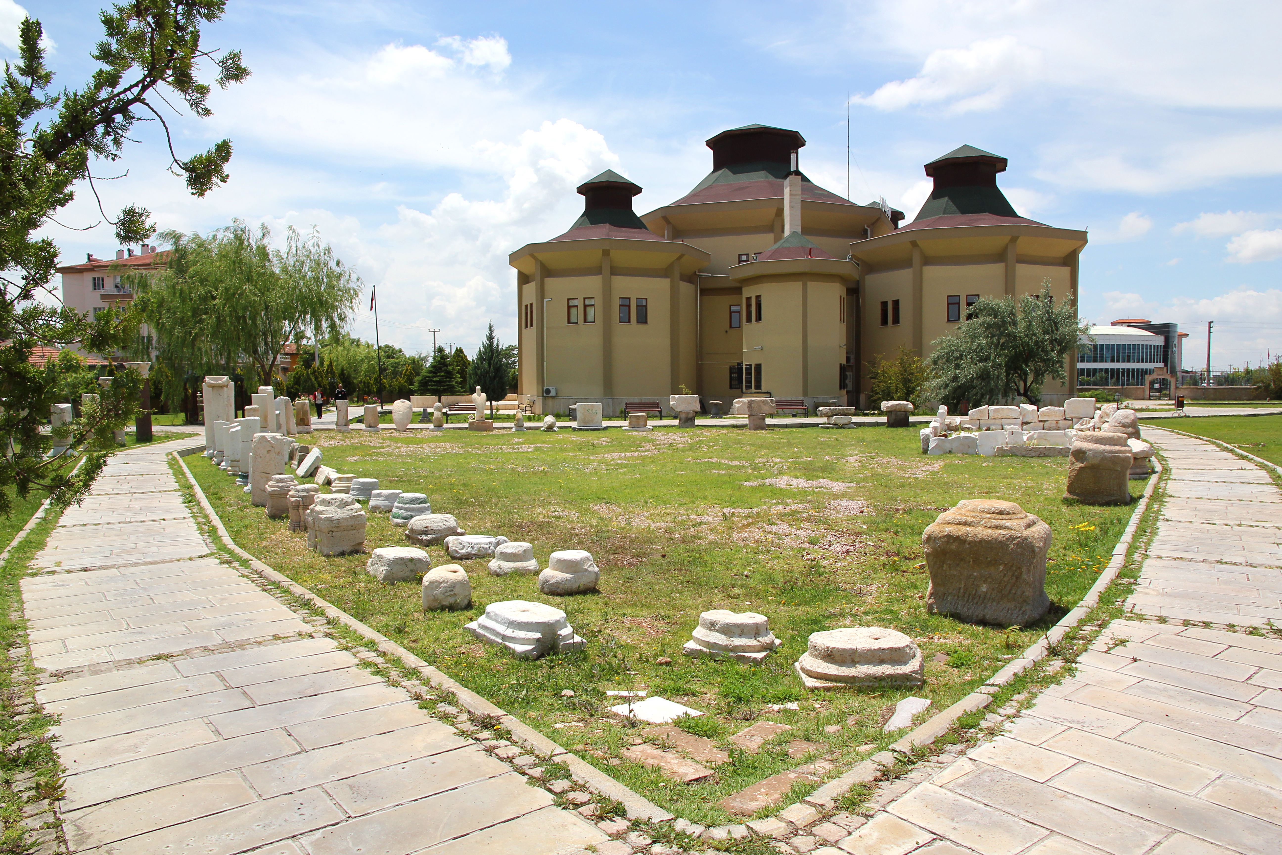 Aksaray Museum, Türkei